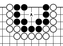 拳頭六(圍棋)